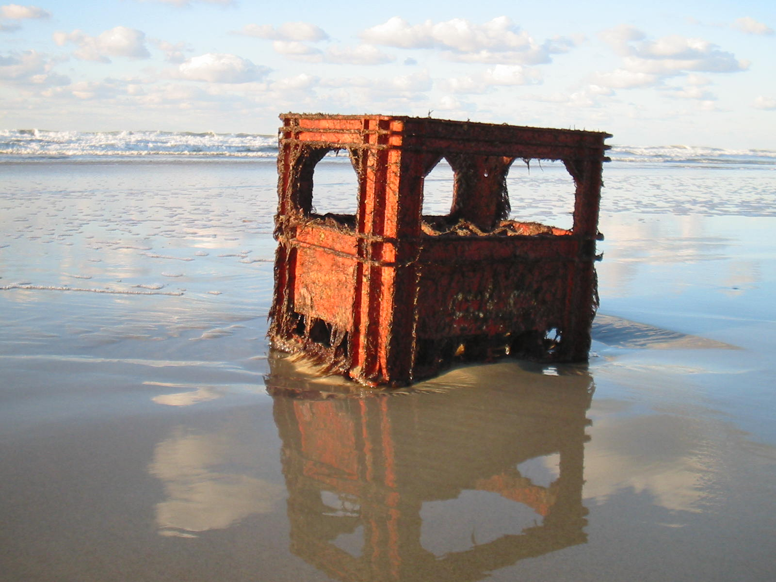 Jetsam - Terschelling Beach.